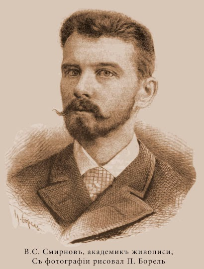 Портрет академика живописи Василия Смирнова (1858 - 1890)